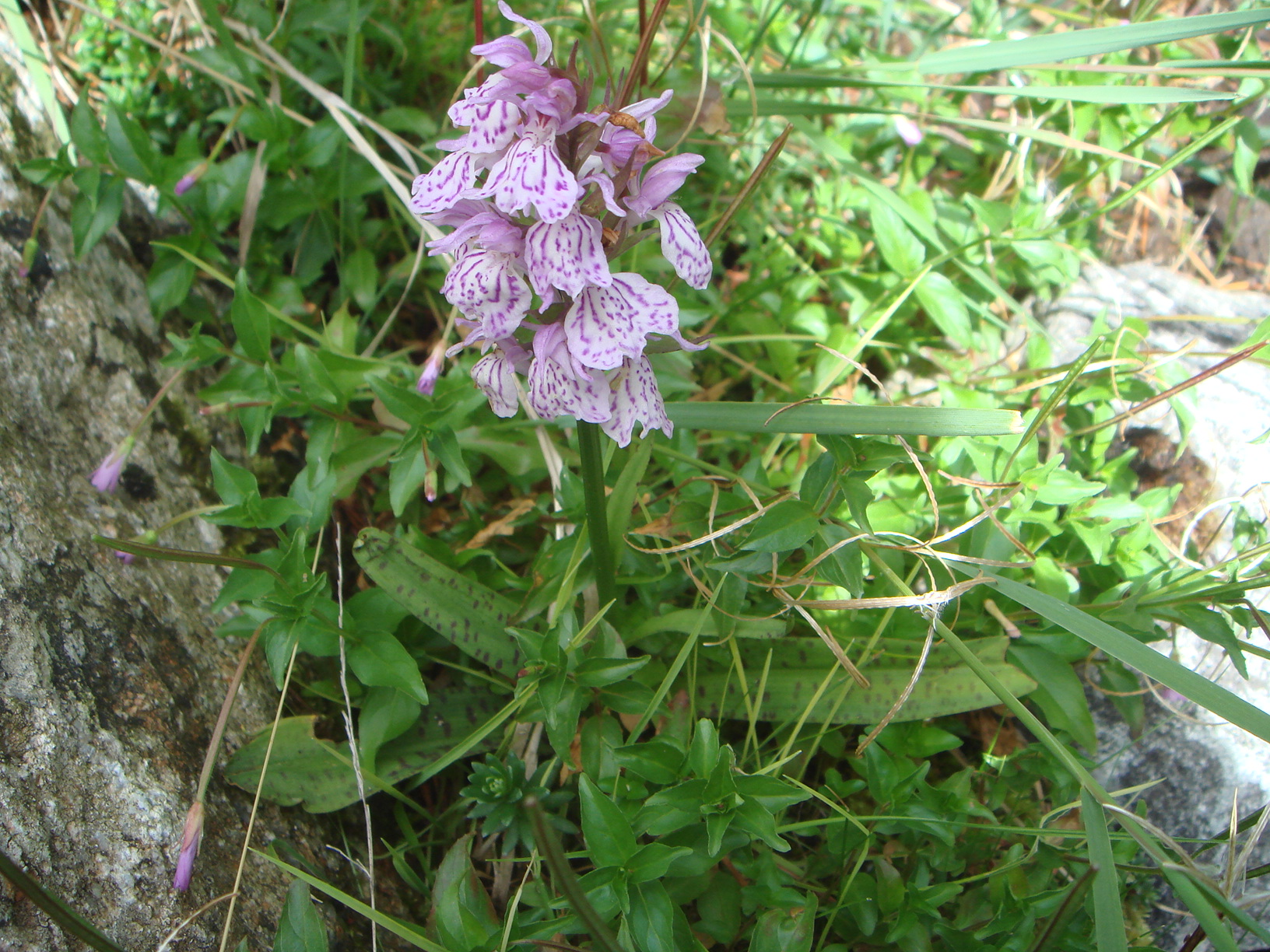 Habitus de Dactylorhiza maculata, Valle de Barrosa, Pirineos, (Huesca), España.